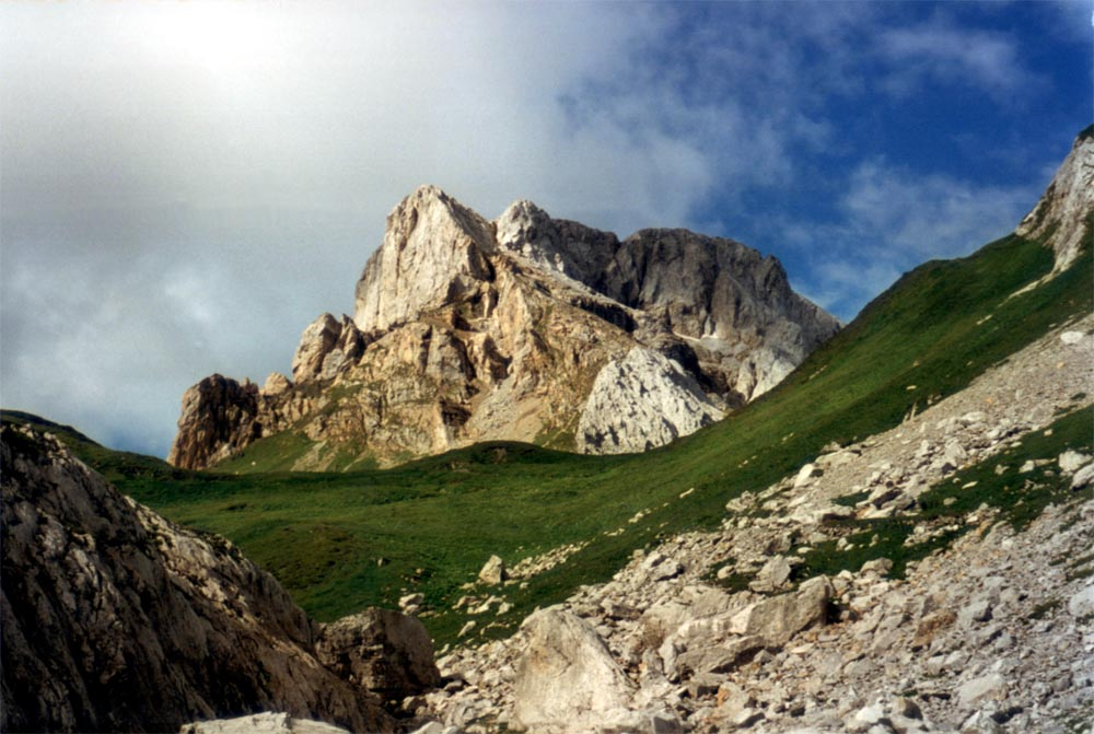 [en]: Monte Peralba (Hochweißstein) seen from NE, Carnic Alps, Italy (south to border to Austria), summit is at the rightmost top [de]: Hochweißstein (Monte Peralba) von NO, Karnische Alpen, Italien (knapp südl. der Grenze zu Österreich), Gipfel rechts außen